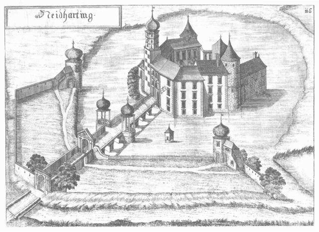 Schloss Neydharting Stich von Michael Wenin